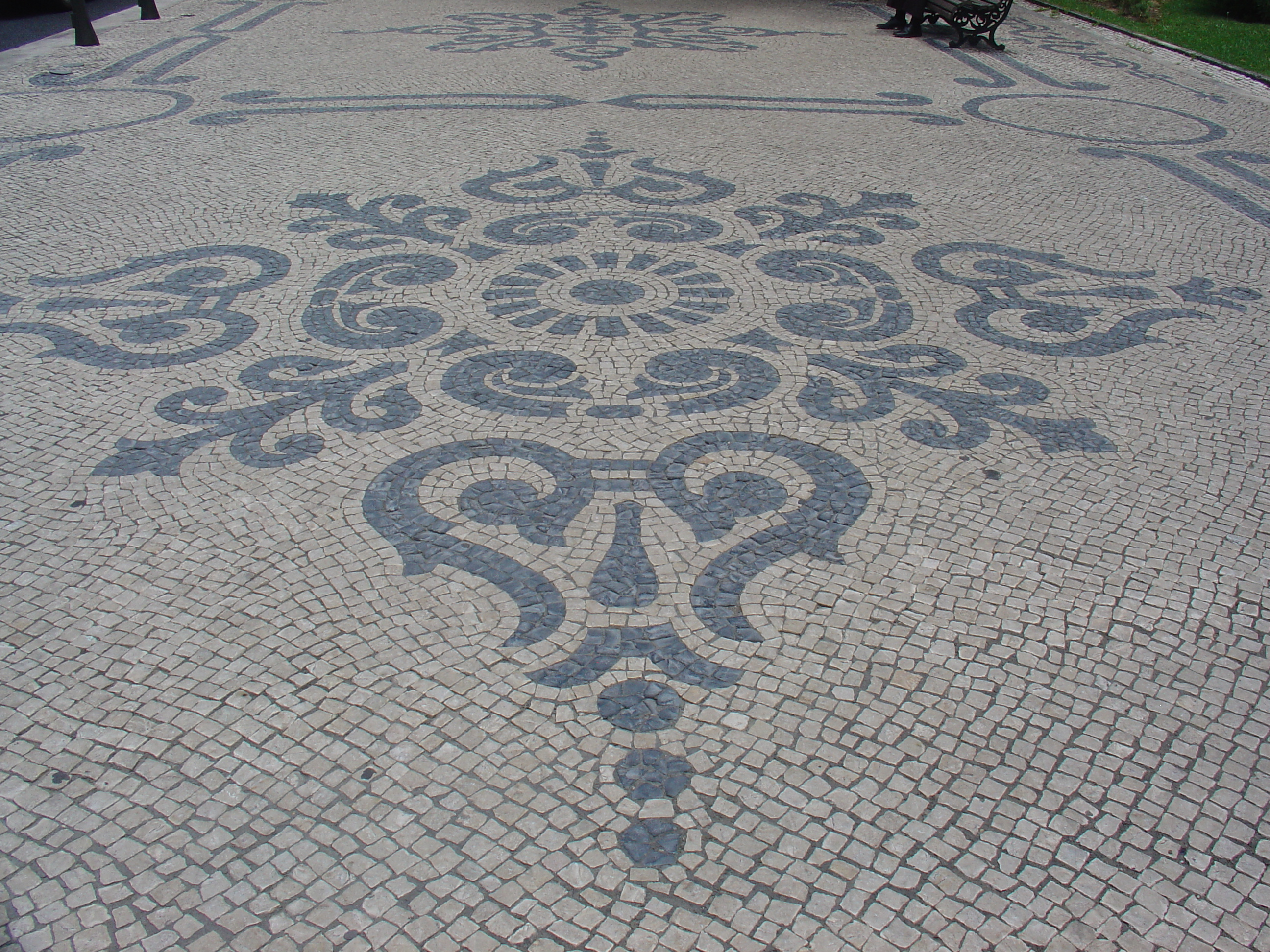 Calçada portuguesa, Lisbonne (Portugal)